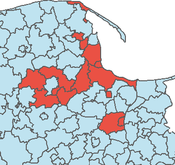 Mapa gmin, na terenie których działa Mevo